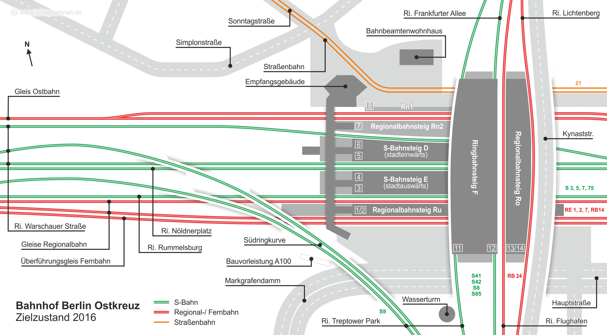 Karte Bahnhof Berlin Ostkreuz - Zielzustand 2016